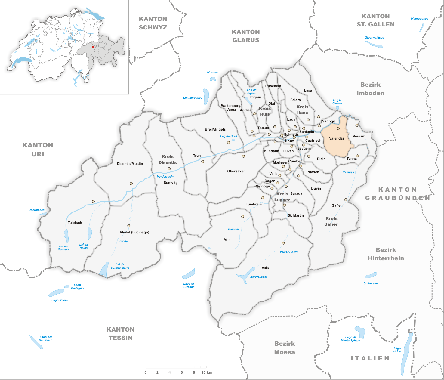 Municipality Valendas